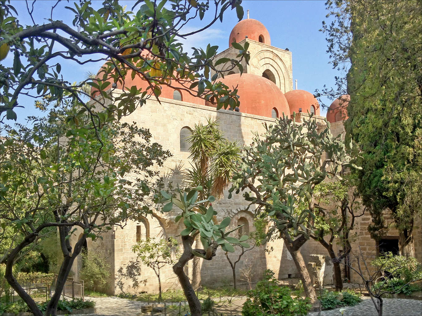 San Giovanni degli Eremiti (Saint Jean des Ermites) à Palerme C'est l'un des monuments les plus caractéristiques du style arabo-normand que l'on peut voir dans la ville de Palerme. L'église a été construite par Roger II en 1132. Ses formes géométriques cubiques comme les cinq coupoles ont été construites par des maîtres artisans arabes auxquels Roger II faisait appel. Cette église dont le plan est en croix latine est surmontée de 3 coupoles. Le transept à été doté d'un campanile. Un petit monastère était contigu à l'église, il en subsiste un cloître. L'ensemble des bâtiments est proche du palais des rois normands. Voir un site réalisé par l'auteur en 2001 sur la Sicile